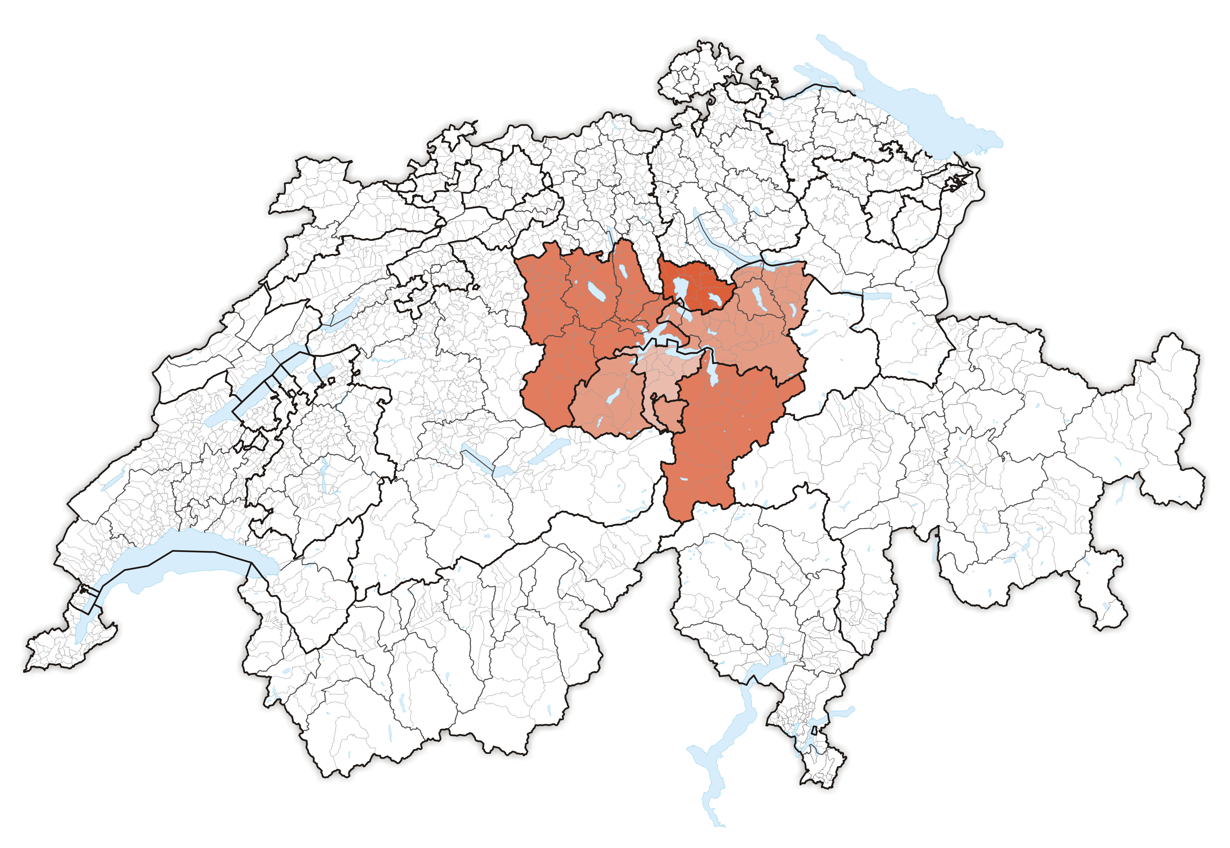 Zentralschweiz